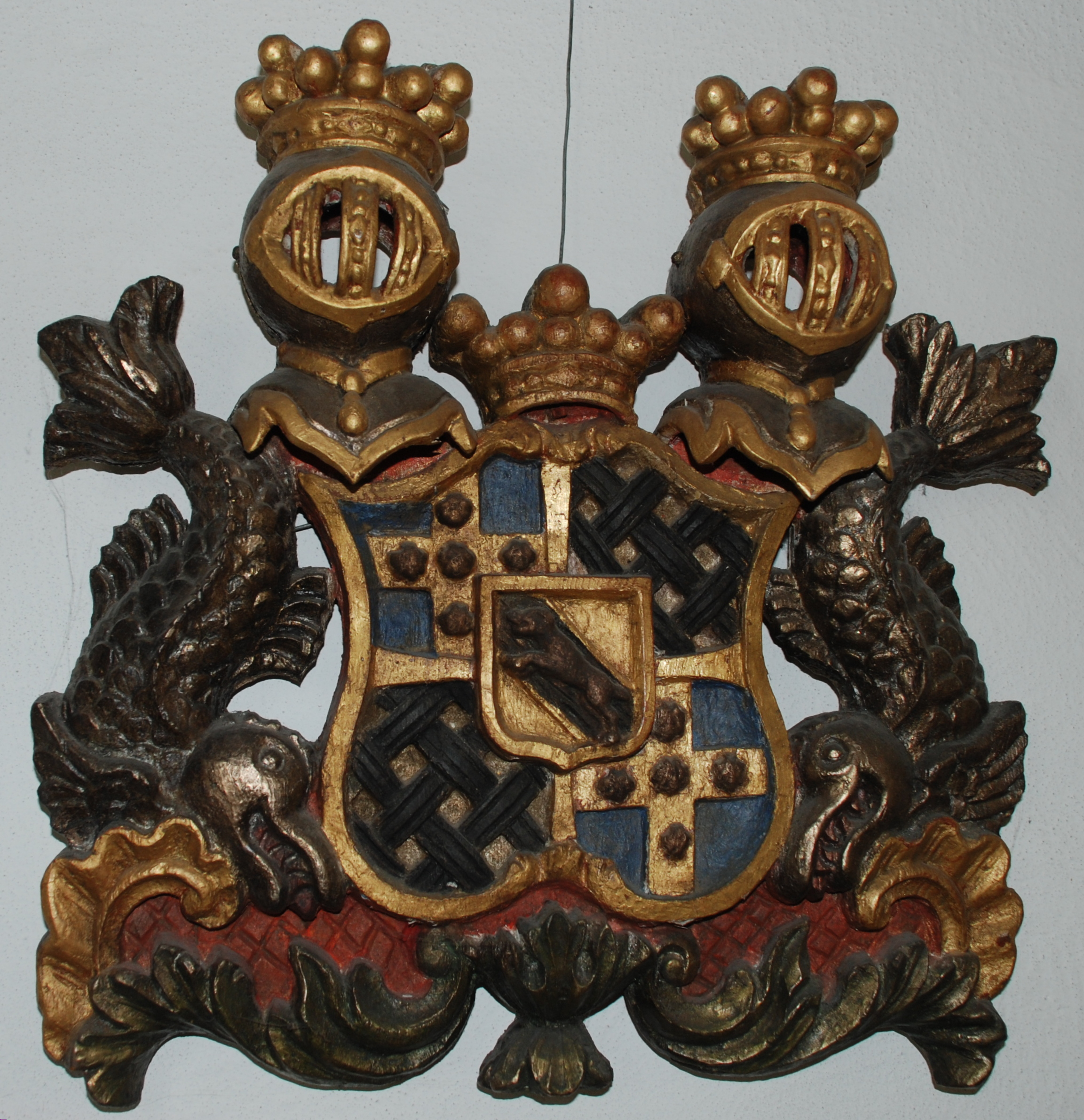 En sköld fördelt i fyra fält och mitt uti fördelningen dess förra adeliga vapn, som är en sköld af gull med et bande, hvaruti visar sig en otter af gull, men af sjelfva friherrliga vapnet är det första fältet blått, hvarutöfver är et kors af gull och i detsamma fem blå musslor. Det andra fältet är af silfver med et svart giller öfver. Det tredje fältet är aldeles likt med det andra och det fjerde med det första. Ofvanpå skölden stå tvänne Öpna tornerhielmar med en friherrlig krona emillan och en på hvardera hielmen.